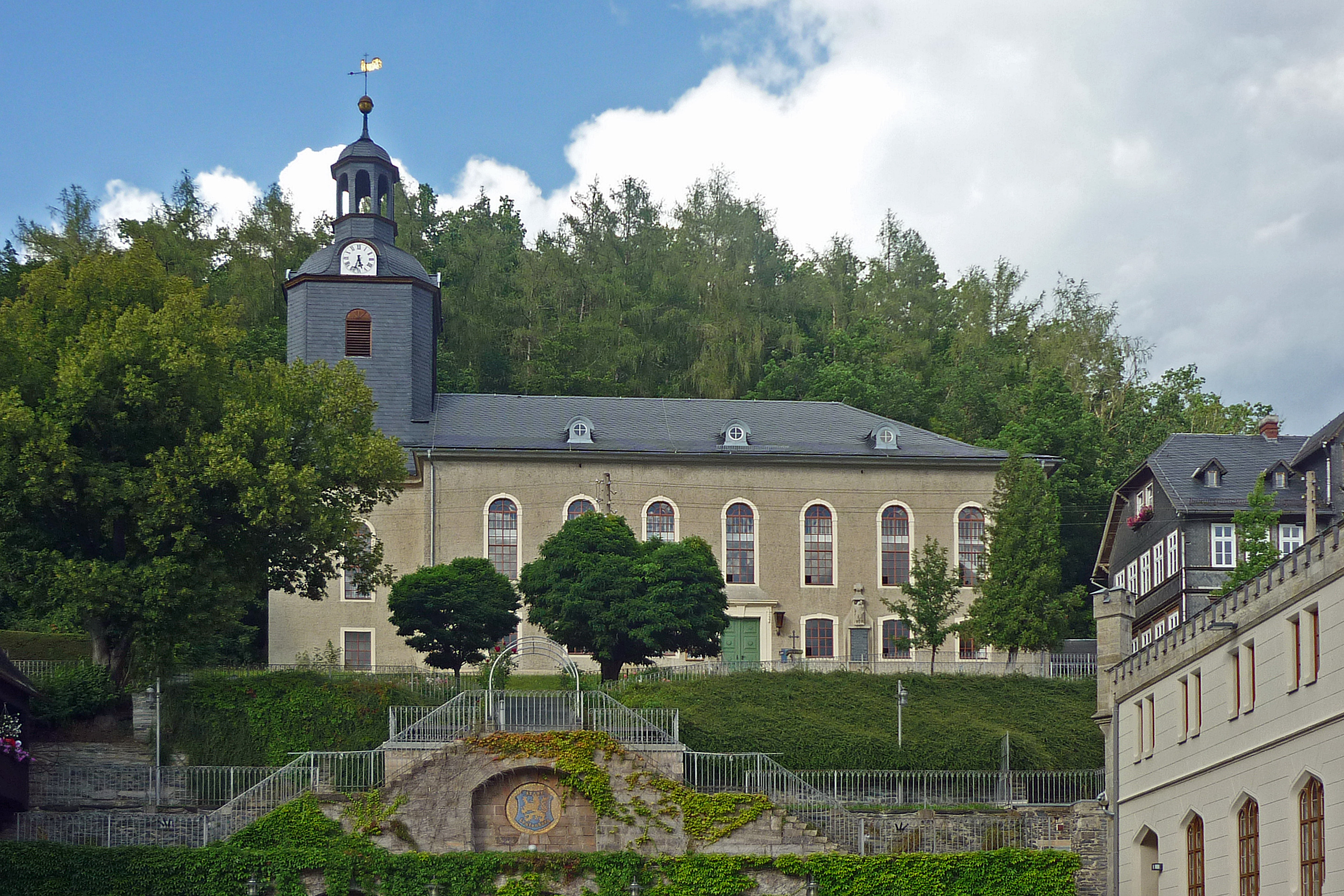 Stadtkirche in Leutenberg – Teil des Denkmalensembles „Altstadt Leutenberg“